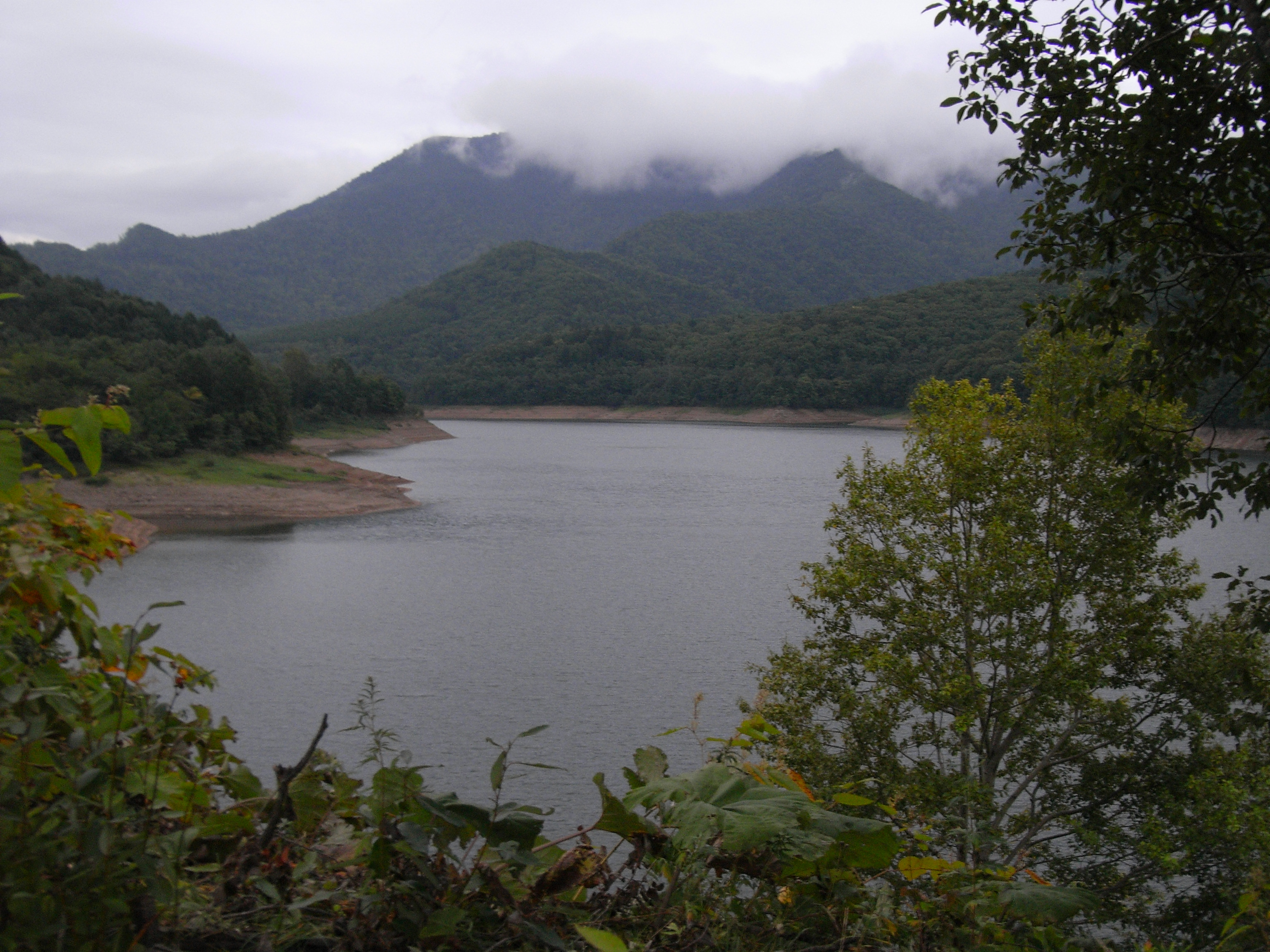 Lake